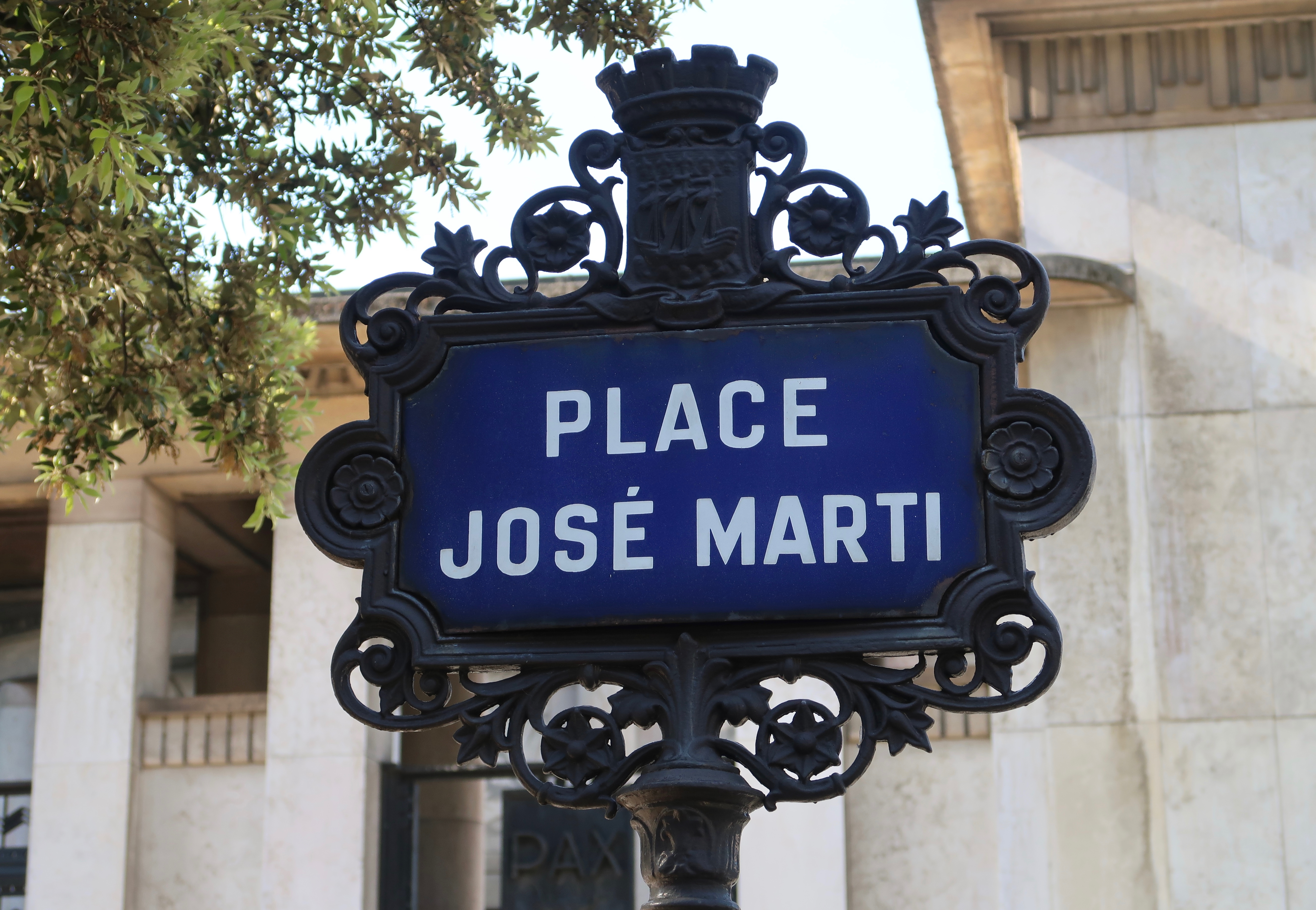 Place José-Marti (Paris, 16e).